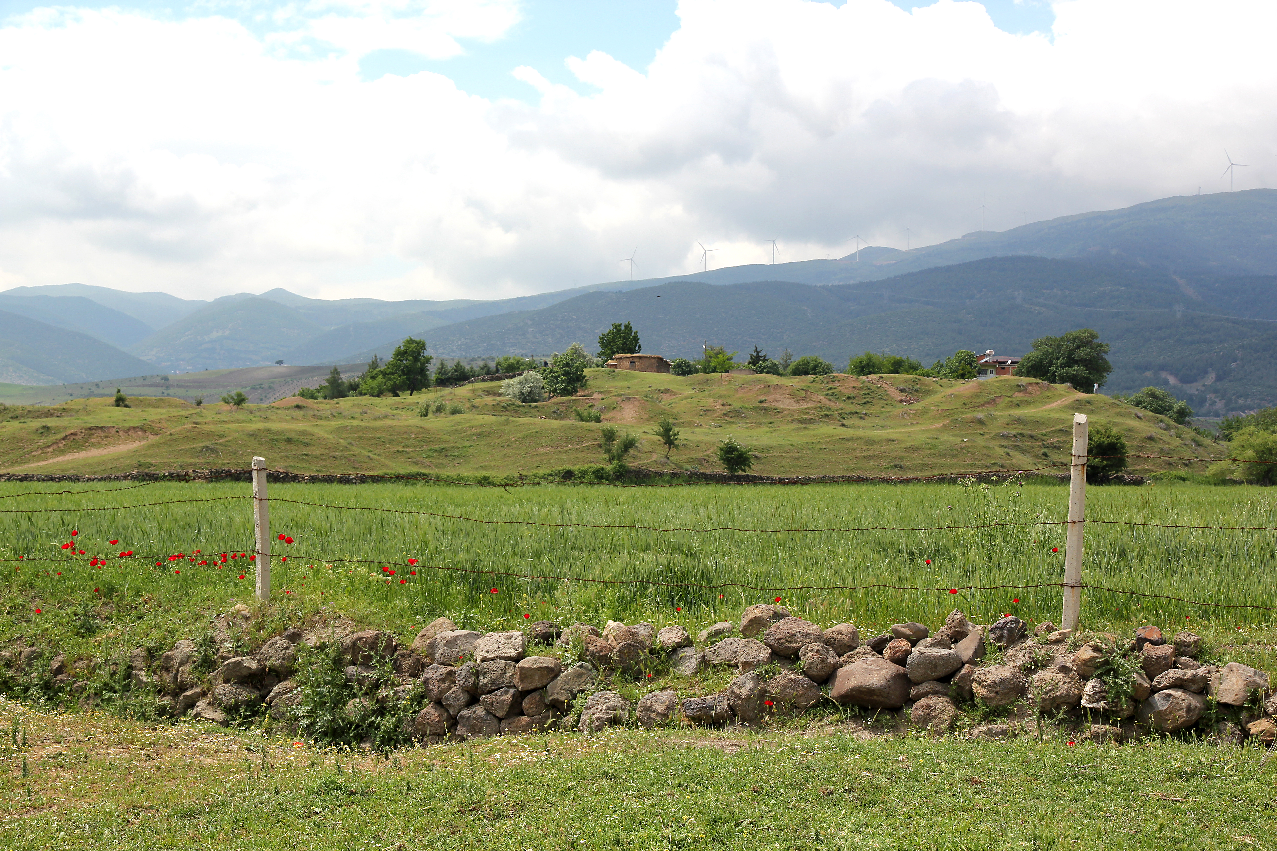 Zincirli (Sam'al), Archäologische Grabungsstelle bei Islahiye, Südtürkei